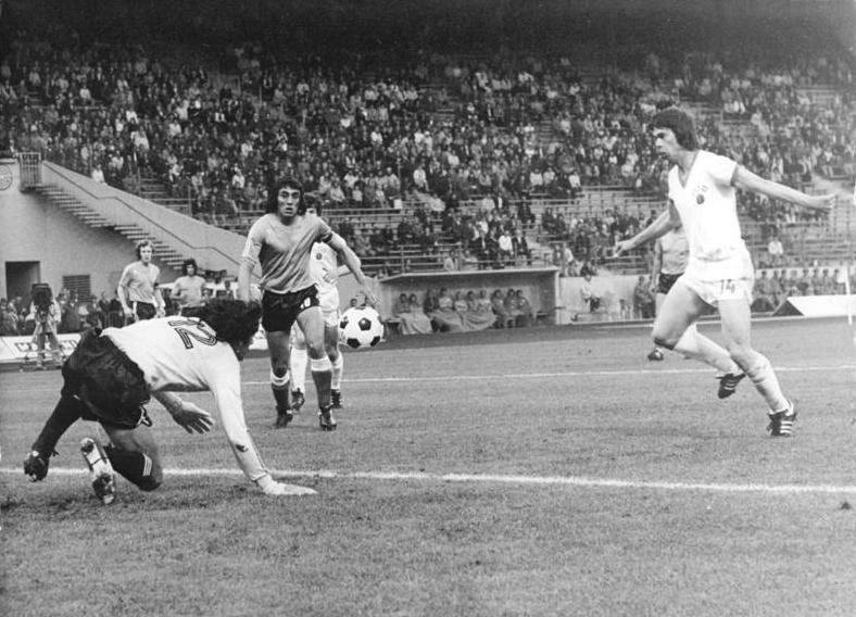 ADN-ZB Mittelstädt 3.7.74 BRD-Gelsenkirchen: X. Fußball-Weltmeisterschaft - 2. Finalrunde, Gruppe A: Argentinien - DDR 1:1 Torwart Ubaldo Matildo Fillol kann den Ball abwehren (links). Dahinter Ramon Armando Heredia (beide Argentinien). Rechts DDR-Stürmer Jürgen Sparwasser.